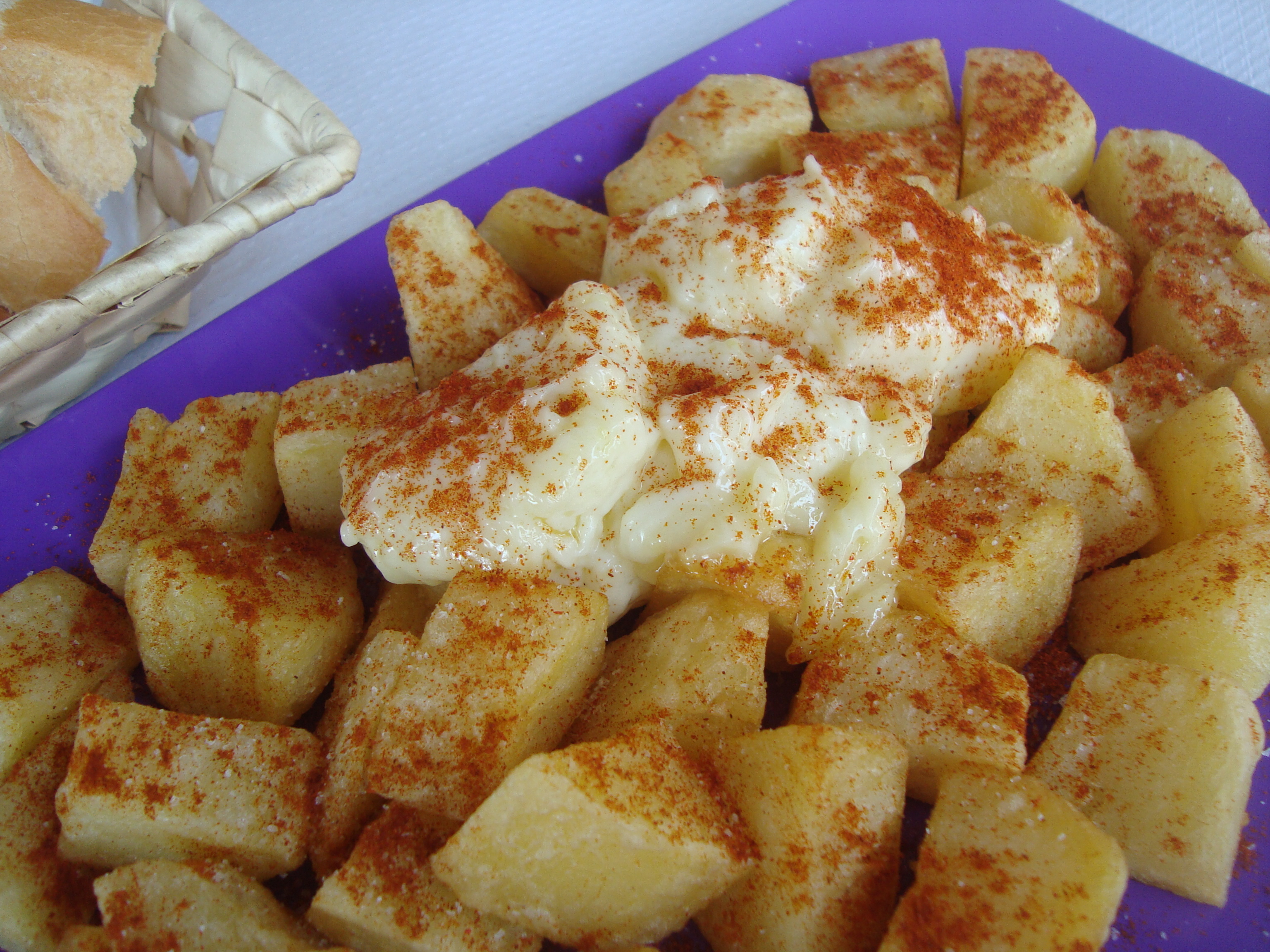 Patatas bravas